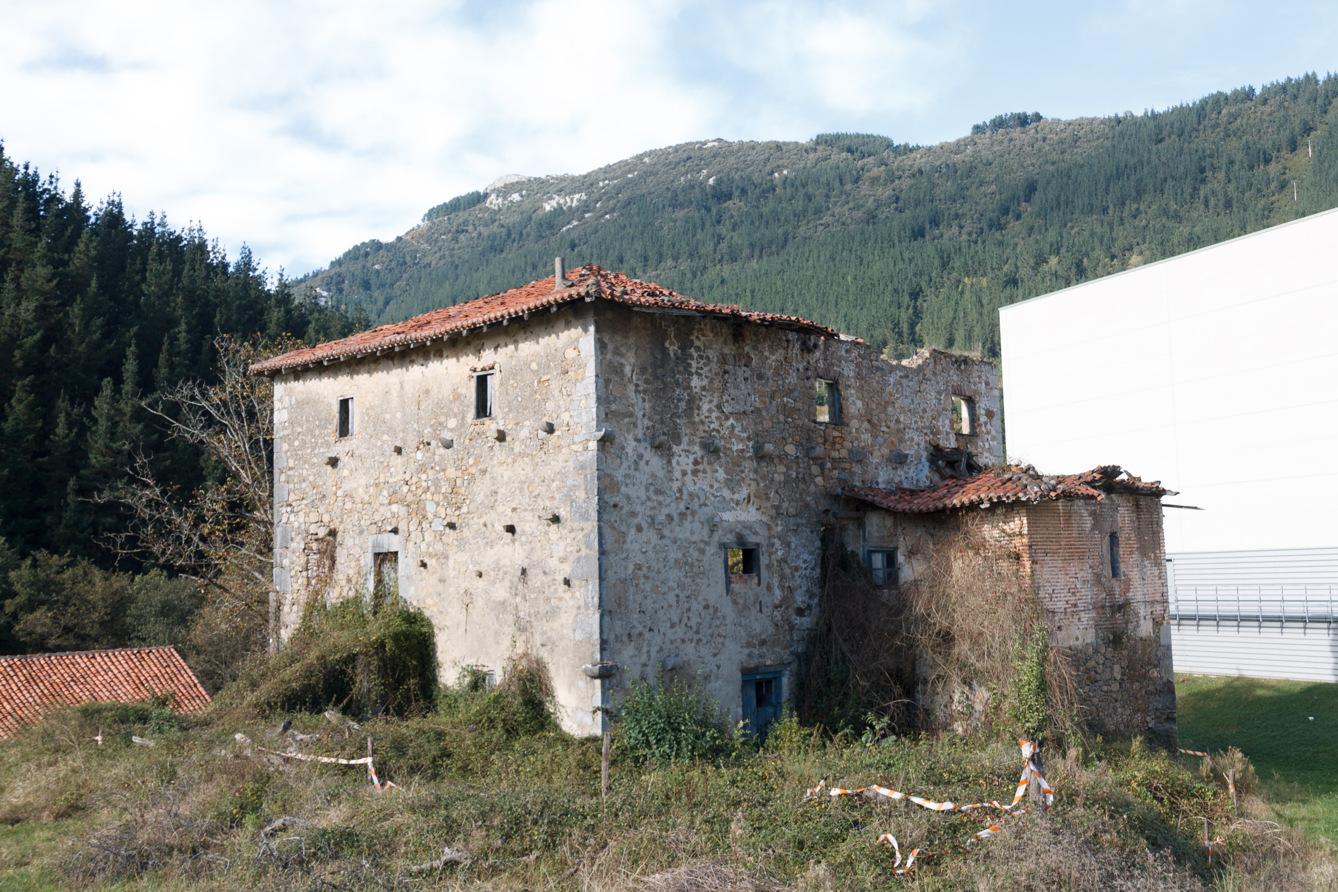 Kareaga dorrea